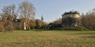 Pictures taken from the street